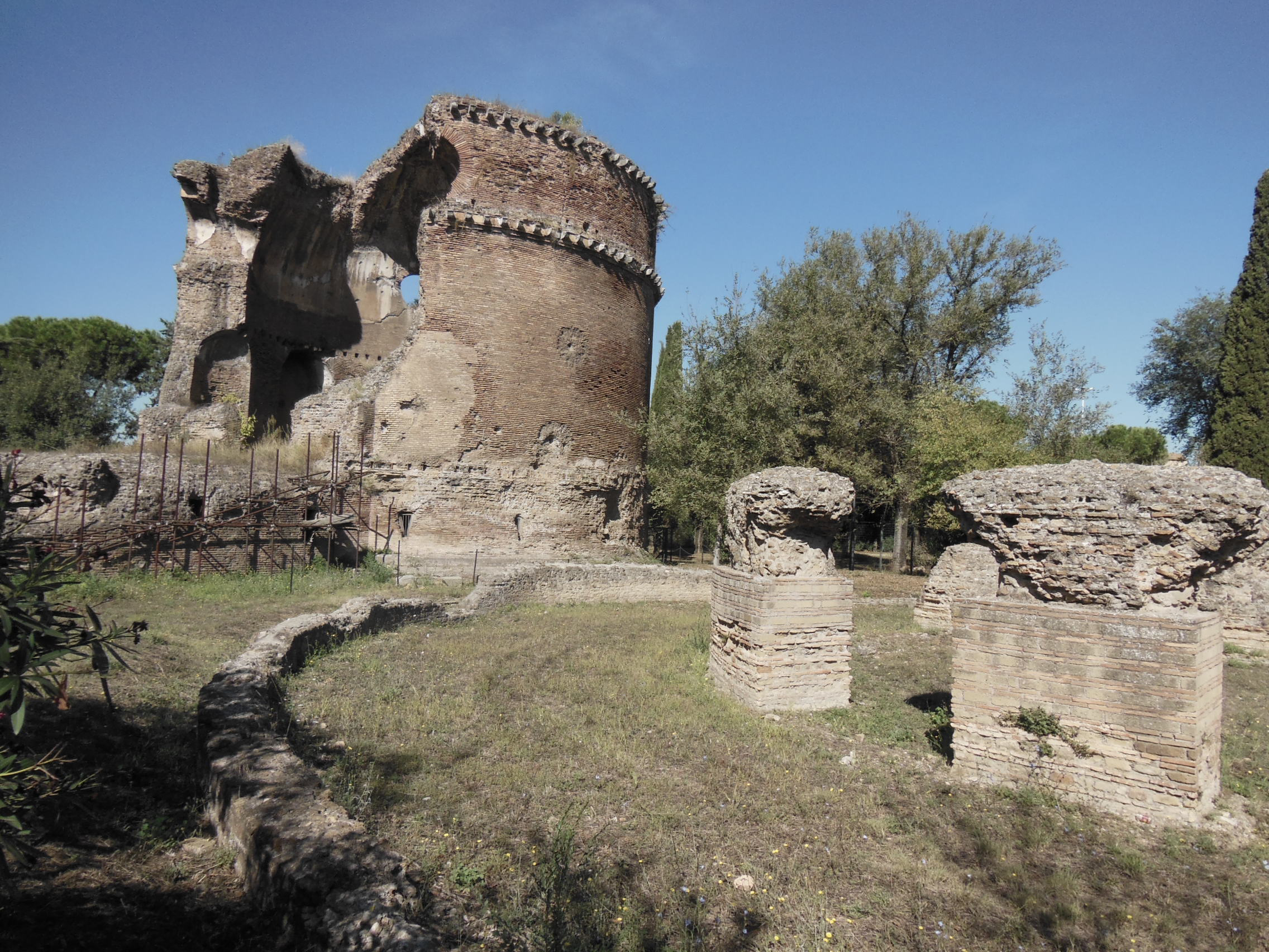 Villa Gordiani, il mausoleo costantiniano e la basilica circiforme This is a photo of a monument which is part of cultural heritage of Italy.